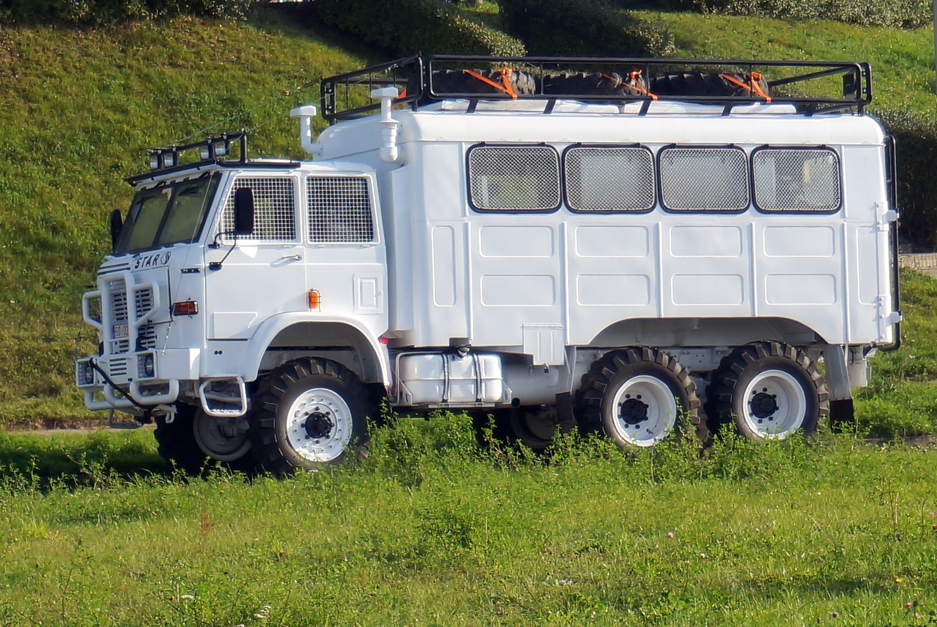 Star 266, ex warsztat techniczny, indywidualnie zmodernizowany do celów turystycznych